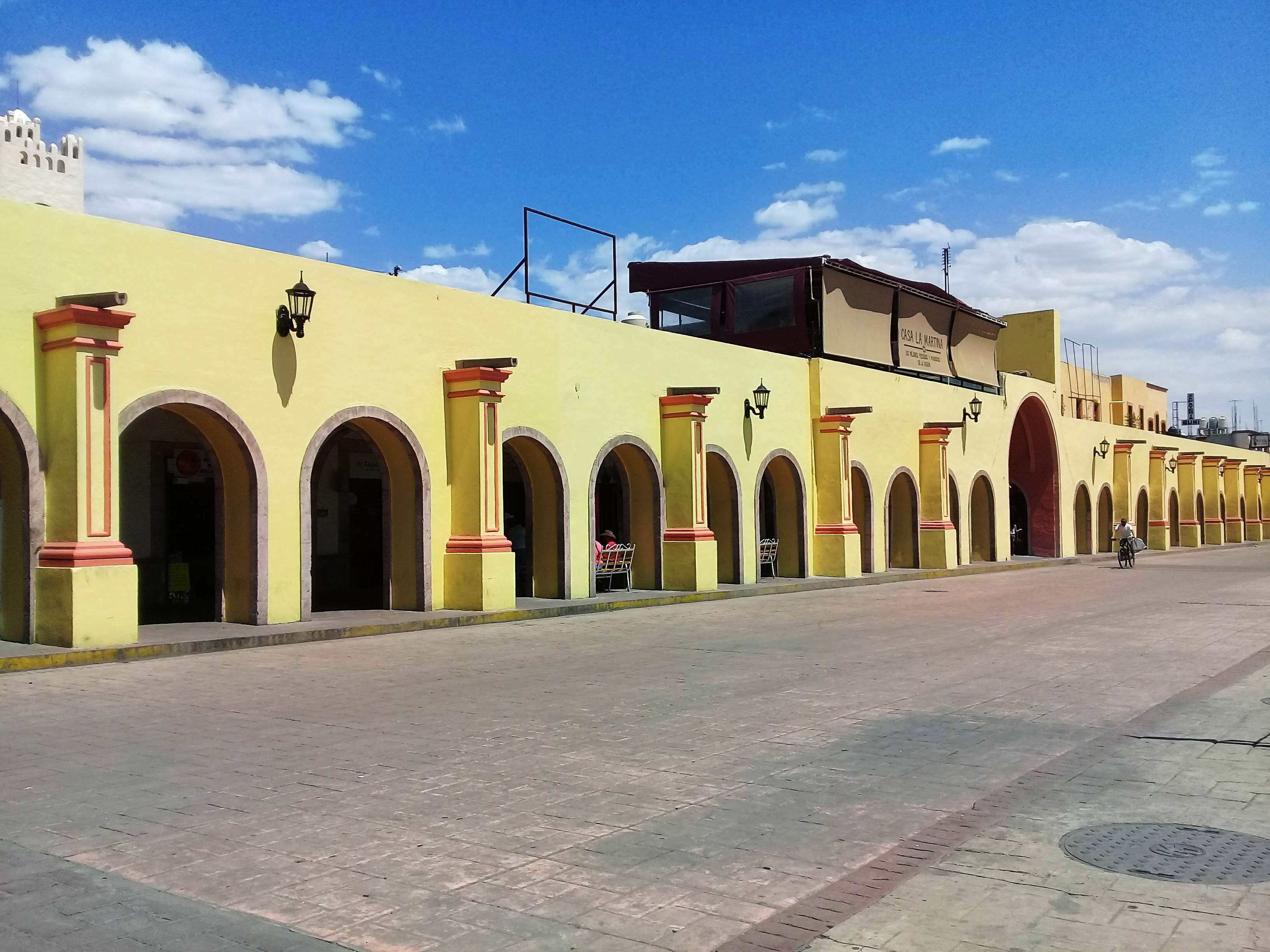 Plaza Juárez en Actopan, Hidalgo, México.